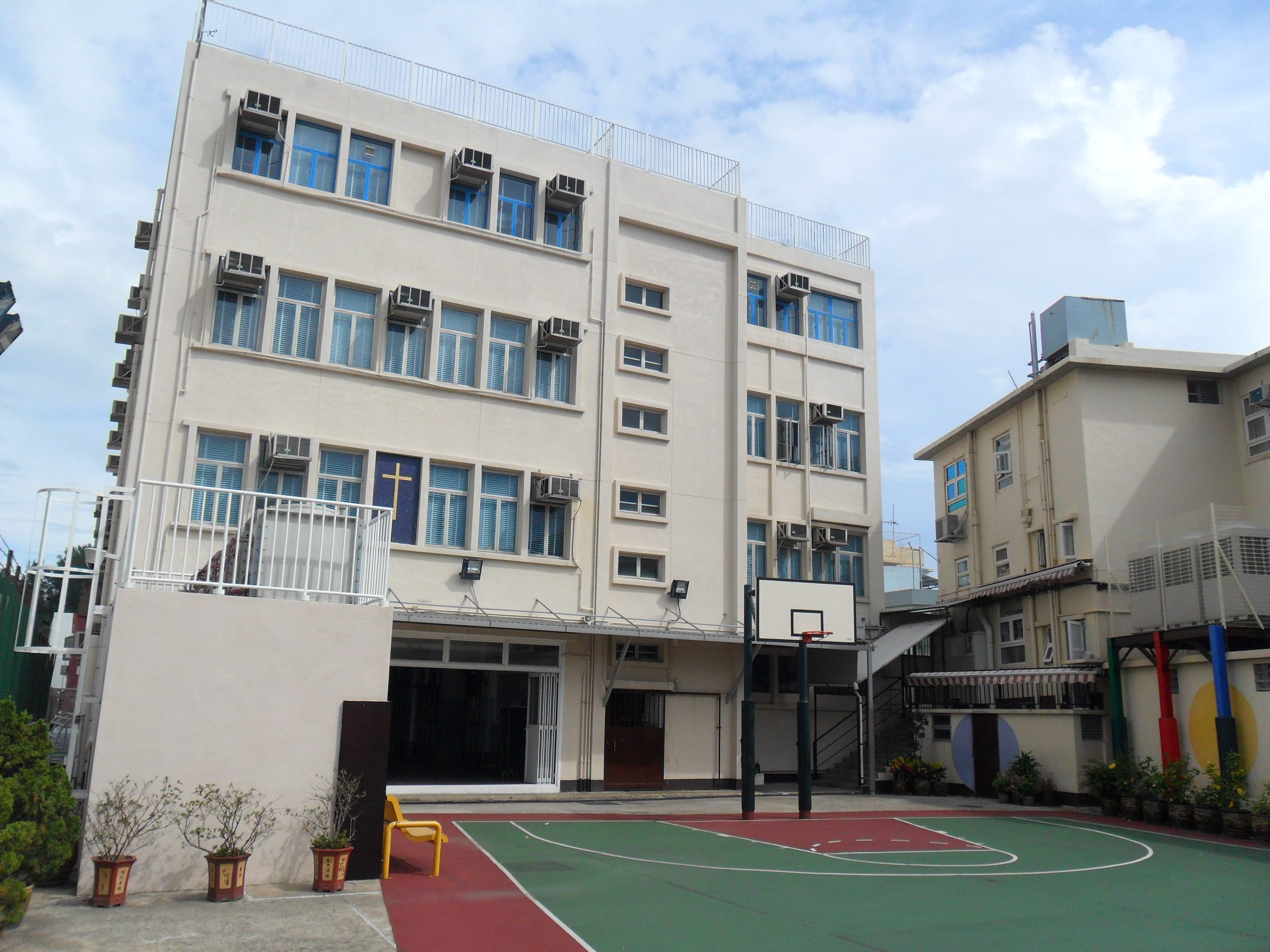 中文（香港）: 聖心小學, 香港, 中國